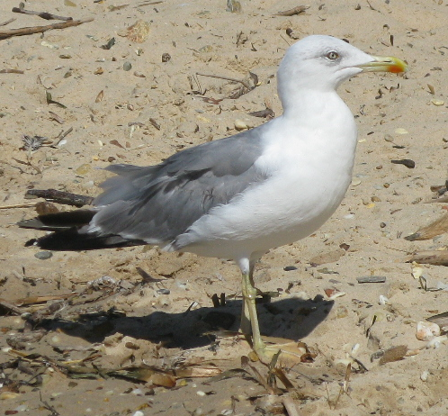 Goéland leucophée (larus michahellis) sur le sable à Porquerolles.